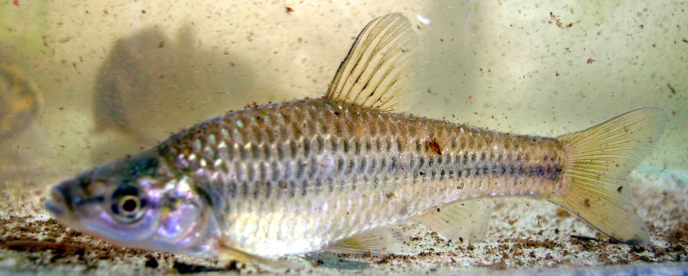 Pseudorasbora parva Limburg Belgium